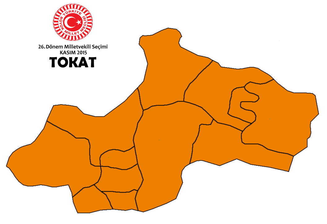 Kasım 2015 Seçimleri